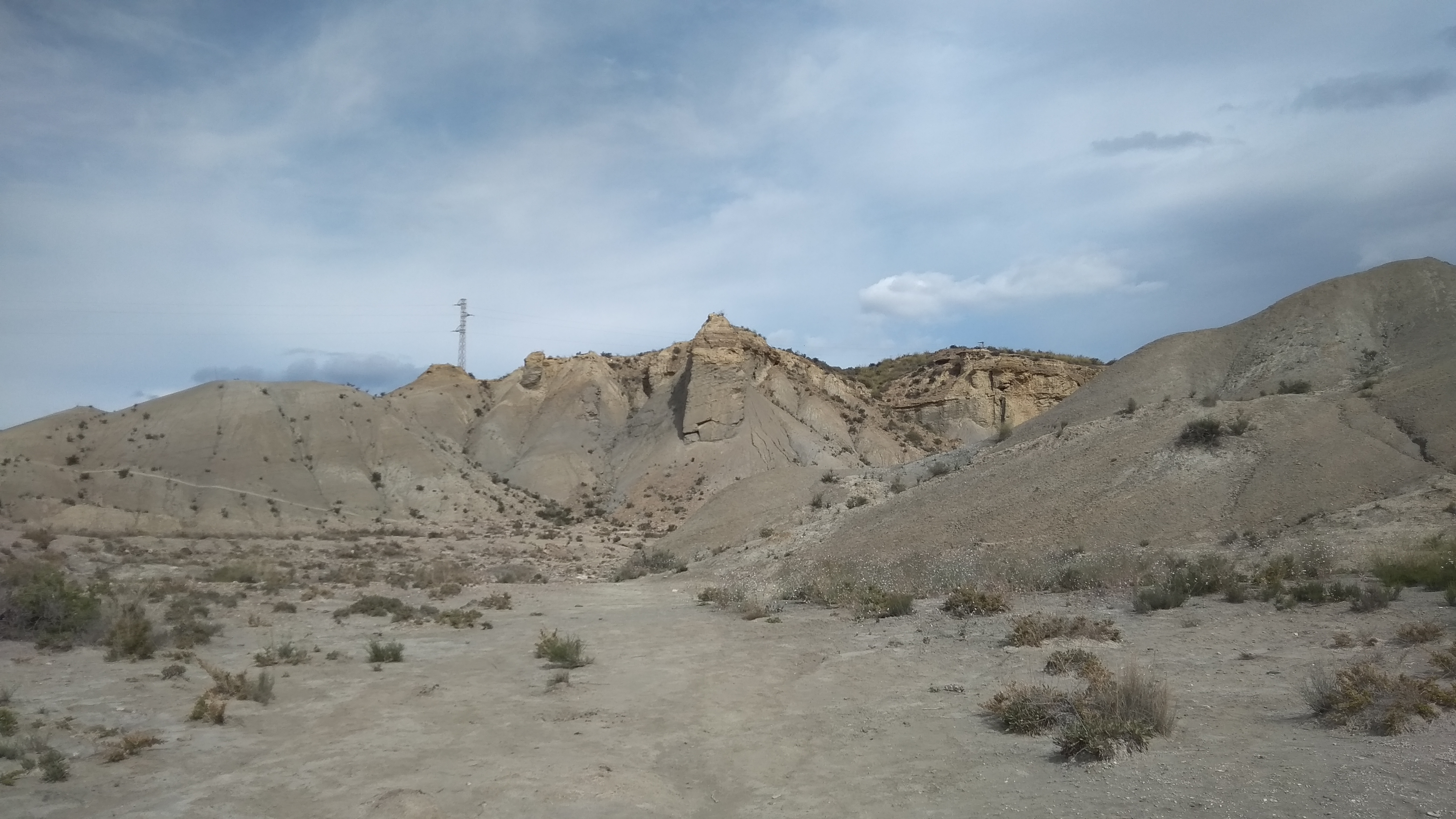 Paisaje del desierto de Tabernas, Almería, en la ruta PR-A 269.